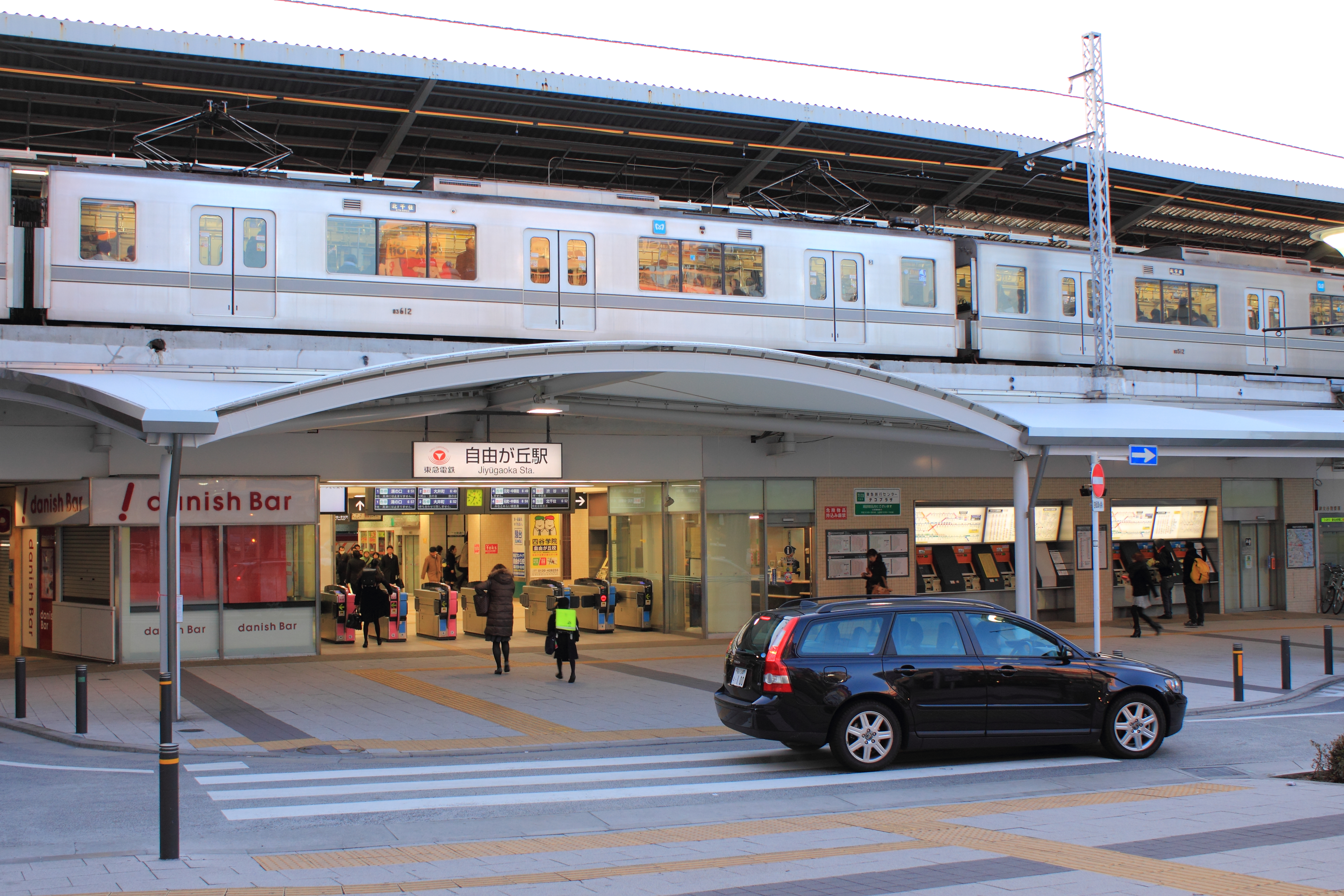 自由が丘駅（東京都目黒区）